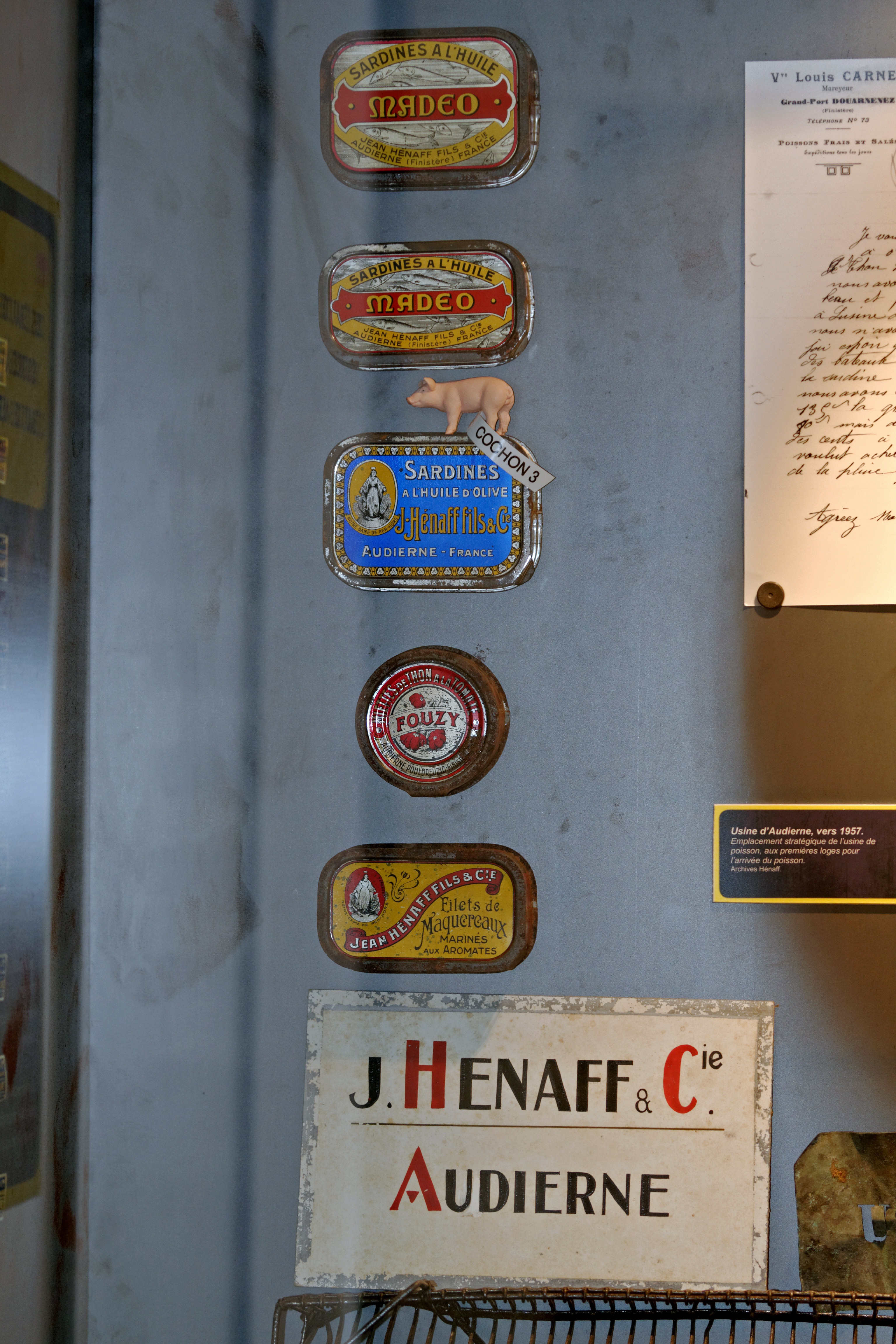 Exposition sur l'histoire du Pâté Hénaff dans le musée de la marque à Pouldreuzic.